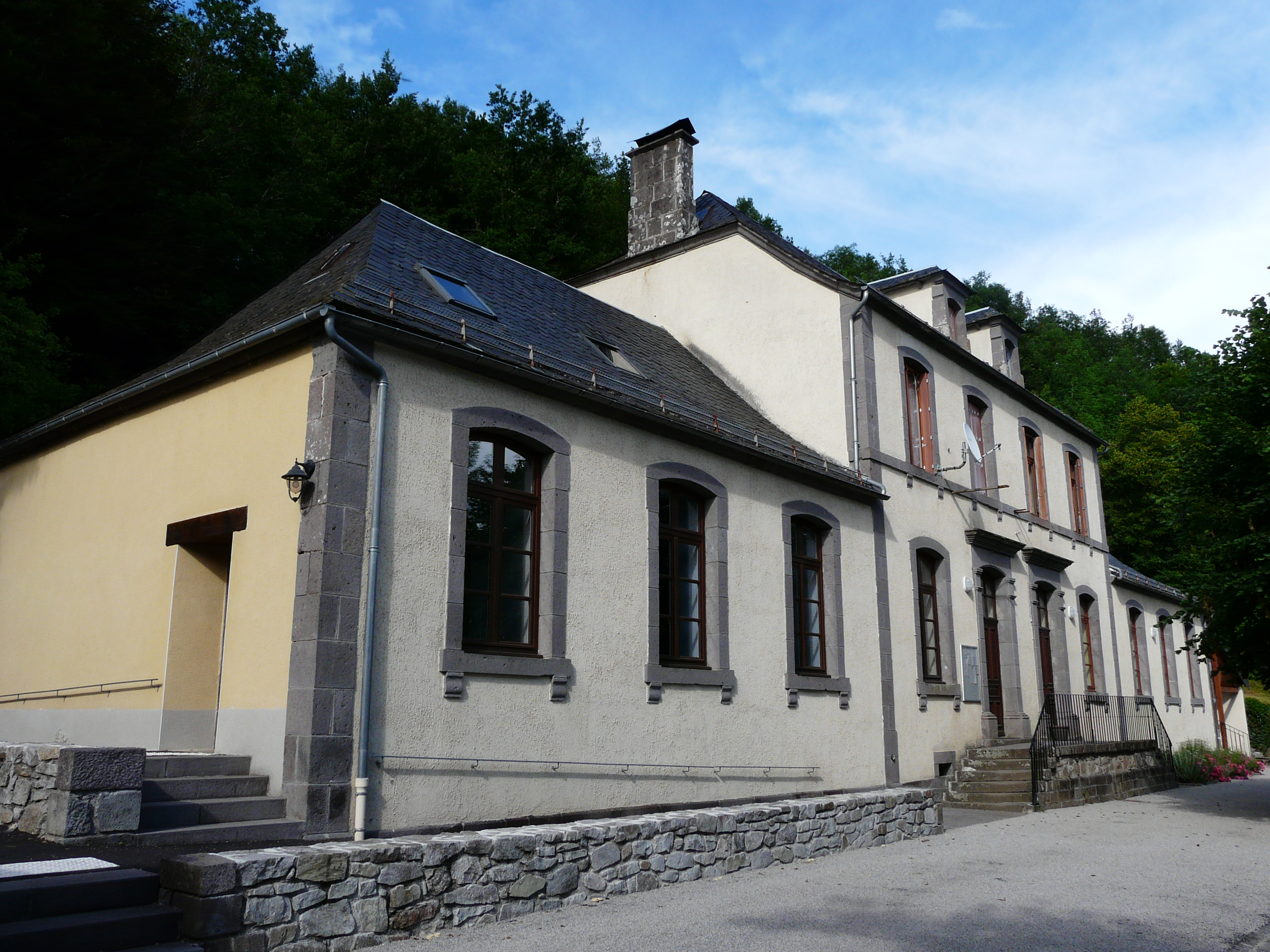 La mairie de Trémouille, Cantal, France.